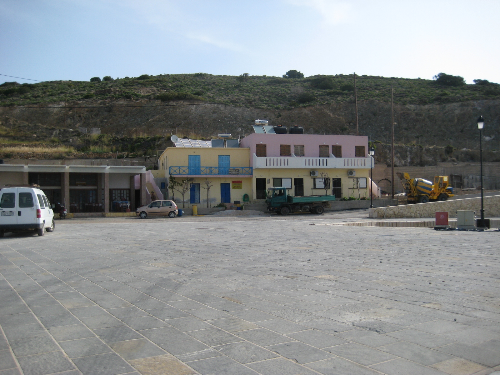 Karave Harbour